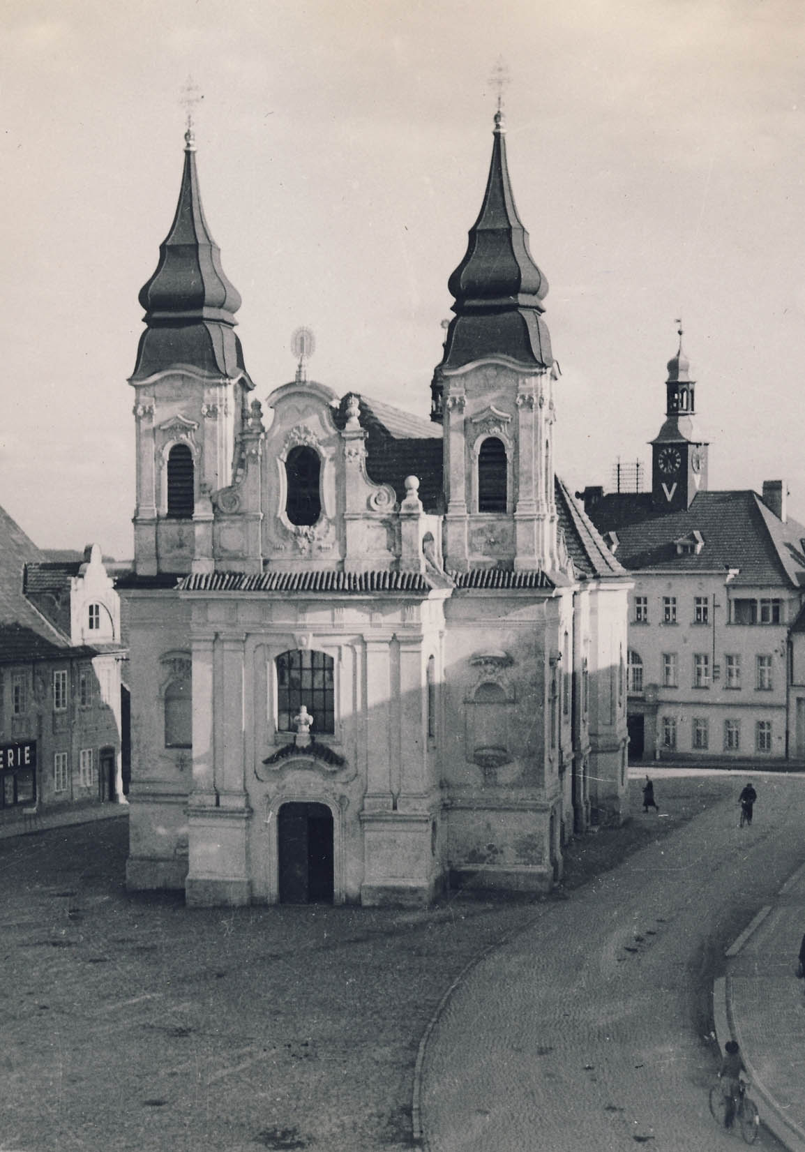 kostel svatého Jana Nepomuckého v Rožmitále pod Třemšínem, během 2. světové války